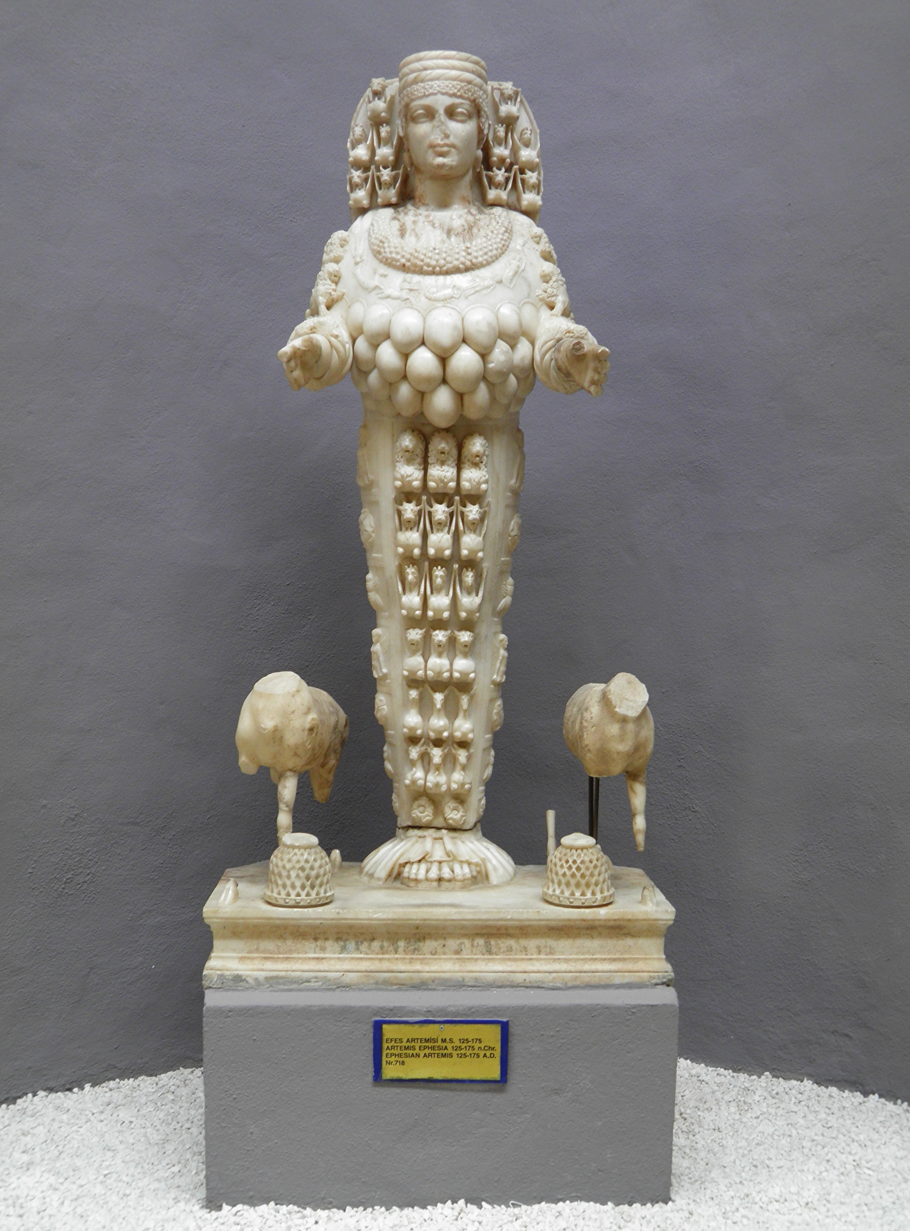 Ephesian Artemis , 125-175 AD, Ephesus Museum, Selçuk, Turkey